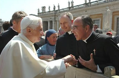 Il Fondatore degli Araldi del Vangelo Mons. J. Scognamiglio a colloquio con Benedetto XVI